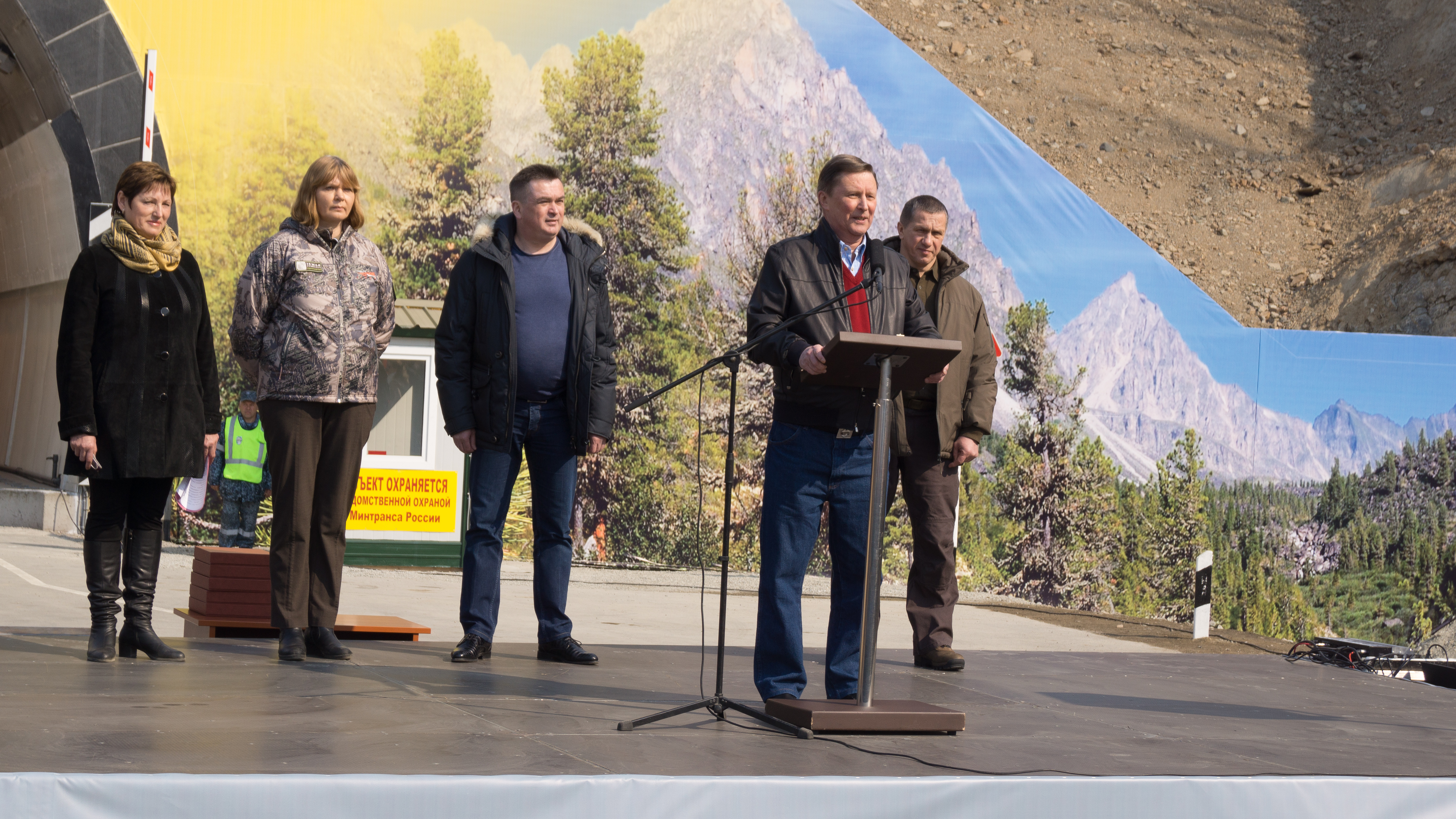 Открытие Нарвинского автодорожного тоннеля 26 марта 2016 года (справа налево - полномочный представитель президента в ДФО Юрий Трутнев, глава администрации президента России Сергей Иванов, губернатор Приморского края Владимир Миклушевский, руководитель национального парка "Земля леопарда" Татьяна Барановская и представитель "Примавтодор")